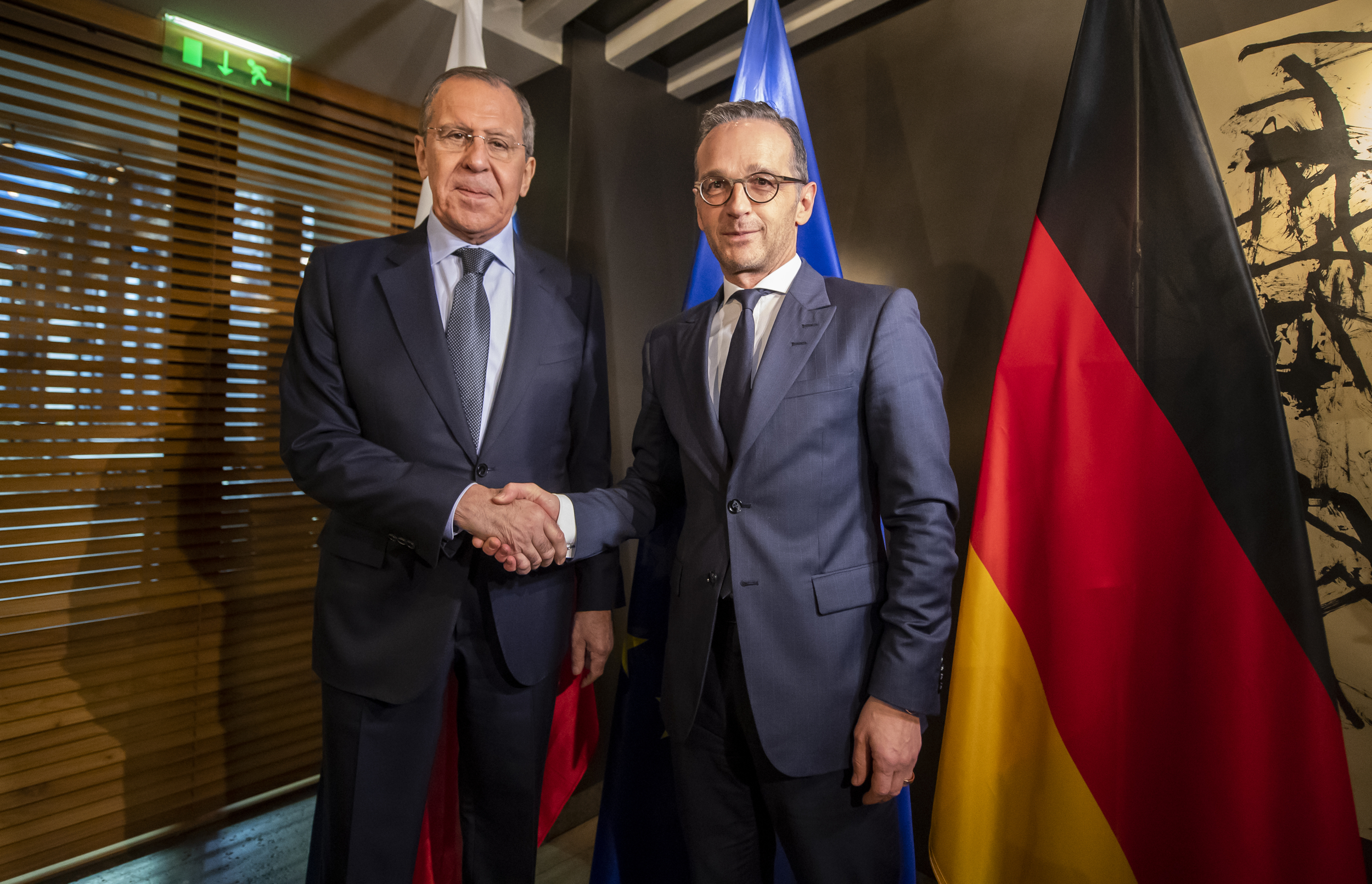 Sergej W. Lawrow (links) und Heiko Maas, Außenminister, bei der 55. Münchner Sicherheitskonferenz.